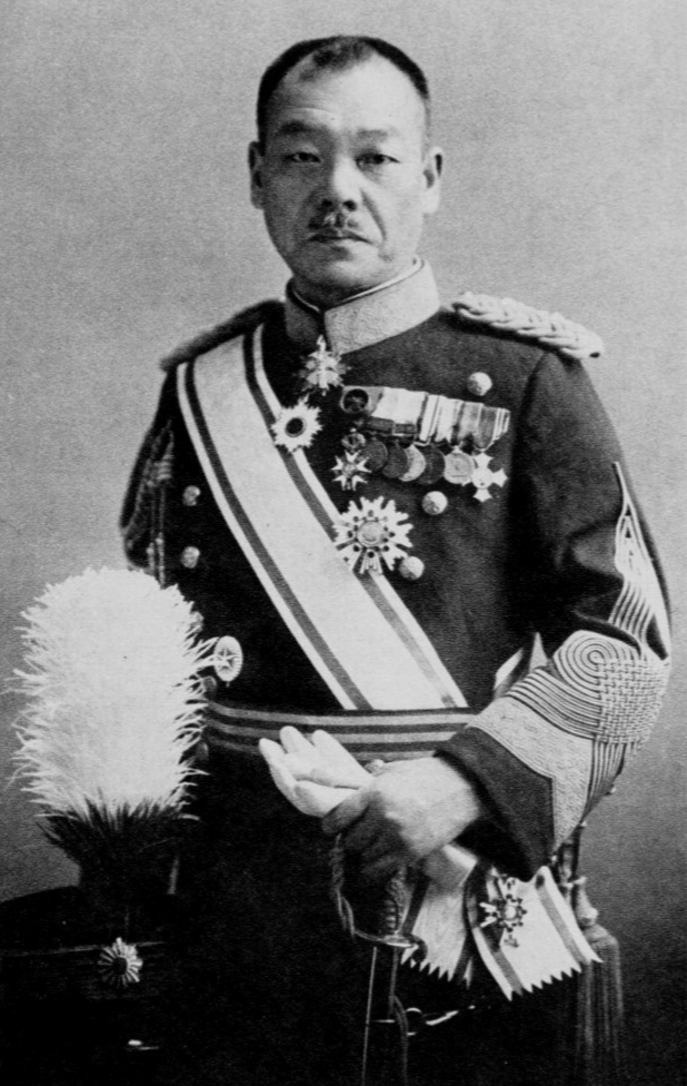 この写真は、小磯國昭（1880-1950）の肖像写真です。